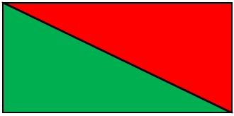 Bandera de Cacha